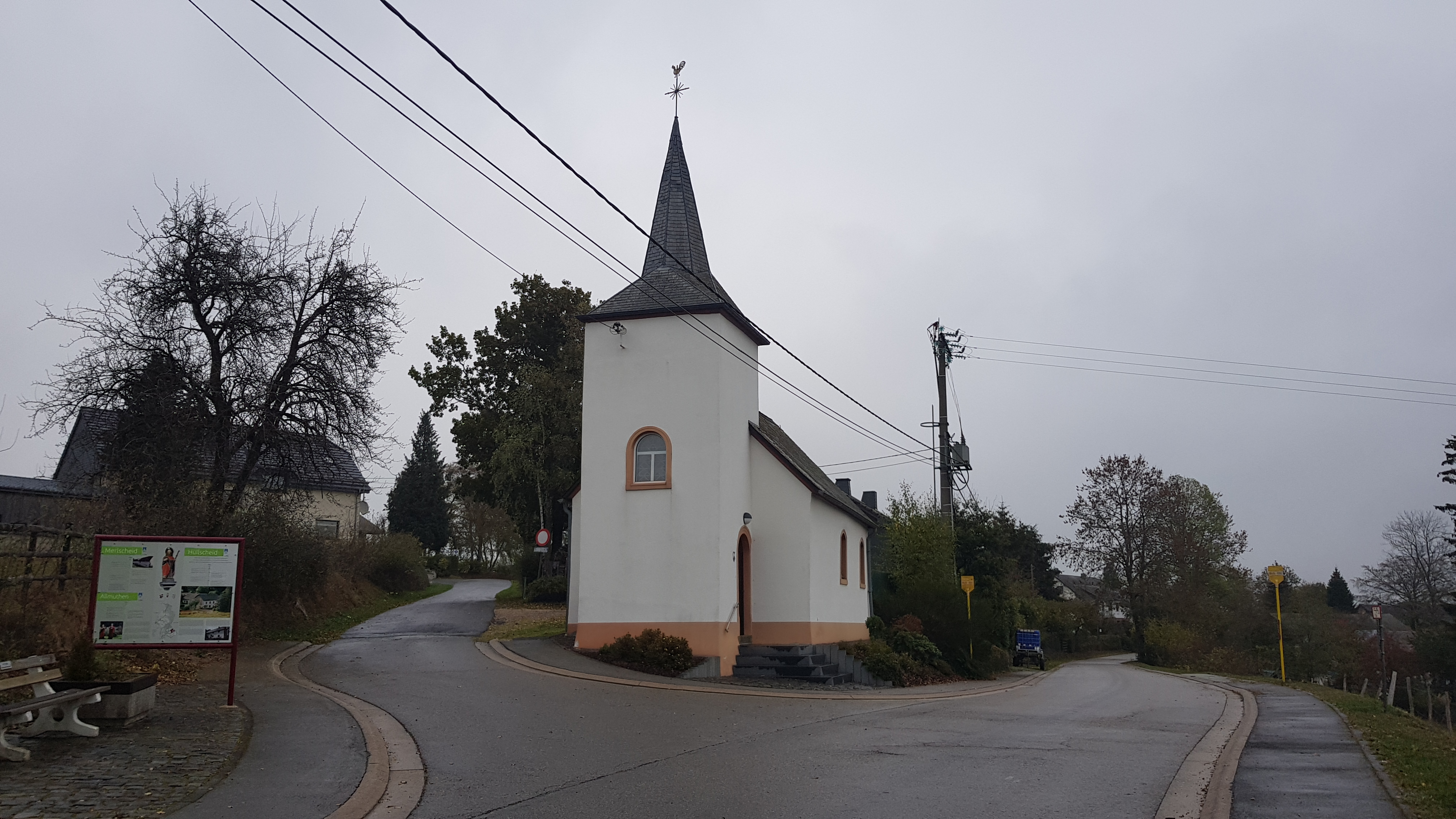 Kapelle St. Brictius, Merlscheid, Büllingen, Belgien This photo of immovable heritage has been taken in the Walloon Region